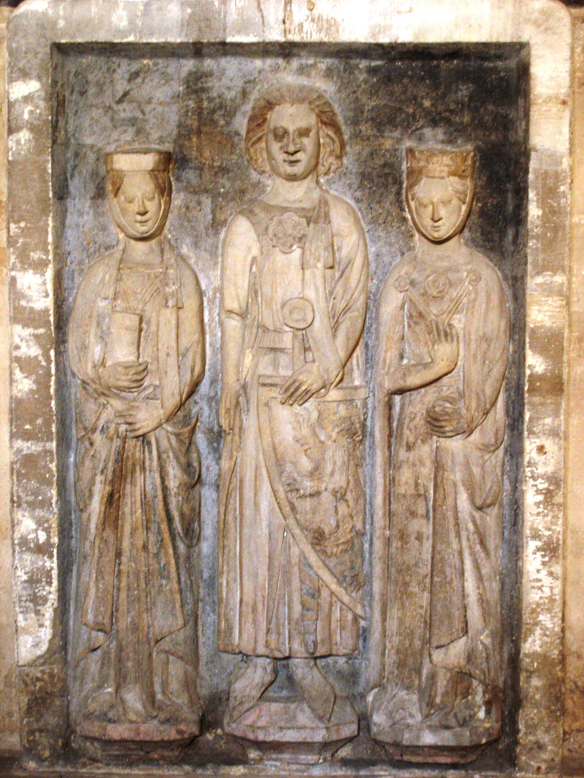 Dies ist der Grabstein vom Graf von Gleichen mit seinen 2 Ehefrauen aus dem Erfurter Dom.